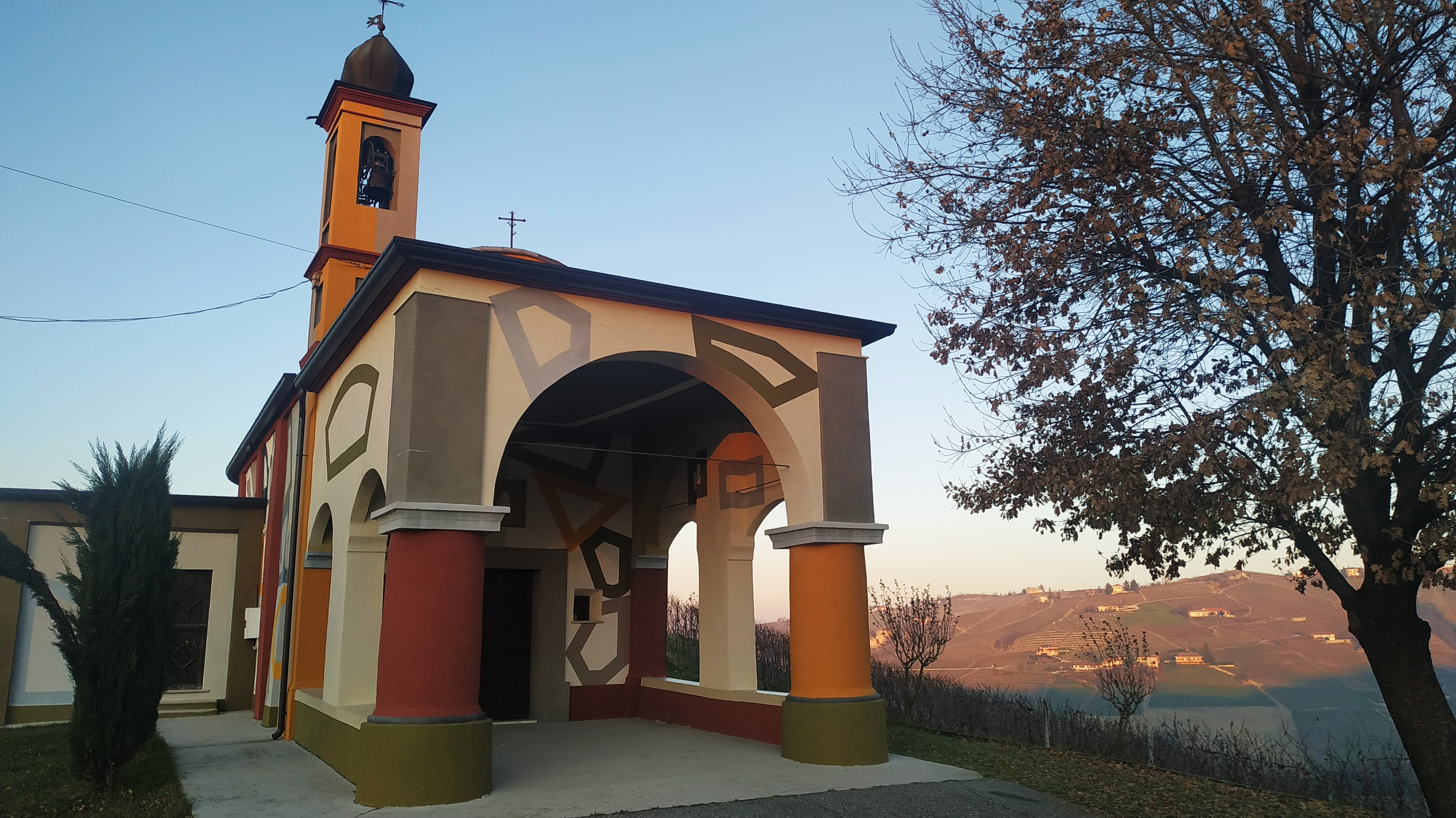 cappella dell'artista David Tremlet a Coazzolo (AT)